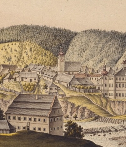 Zámek Kácov Das Pfalz-Zweybrückische Schloss Kaczow im Czaslauer Kreise. J. Venuto